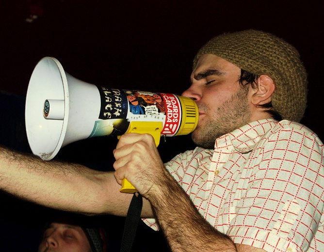 Fisz z jego atrybutem